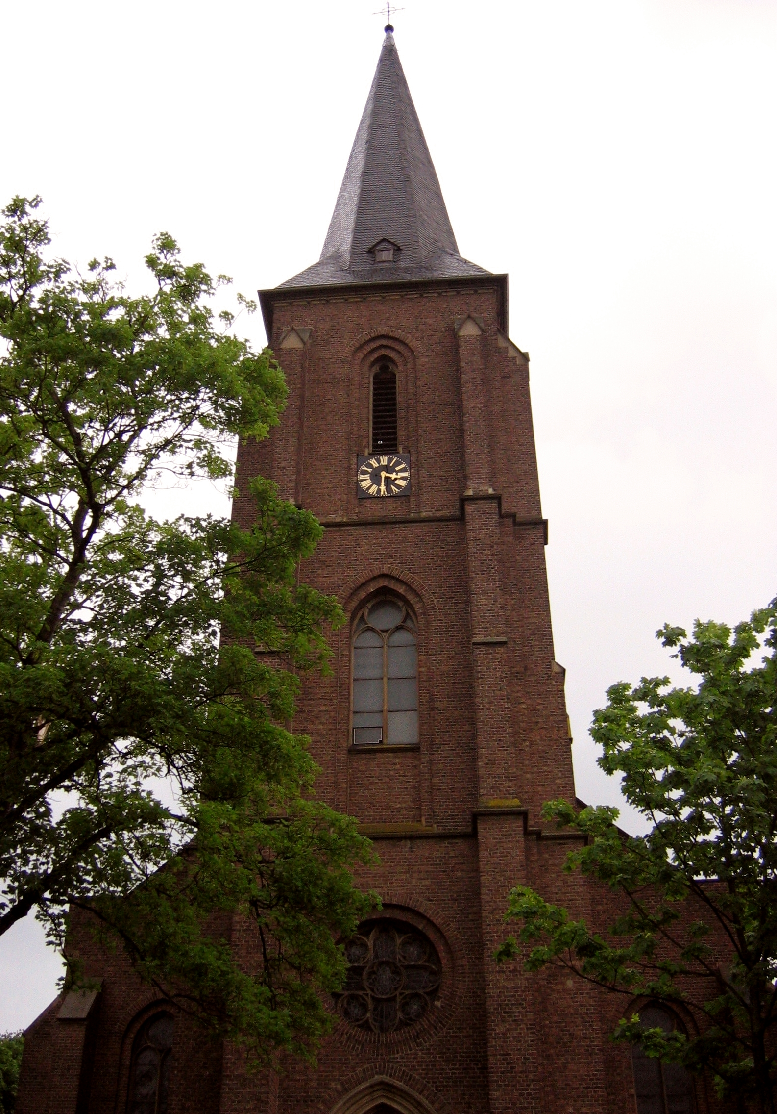 Turm der St.-Maternuskirche in Köln-Rodenkirchen.